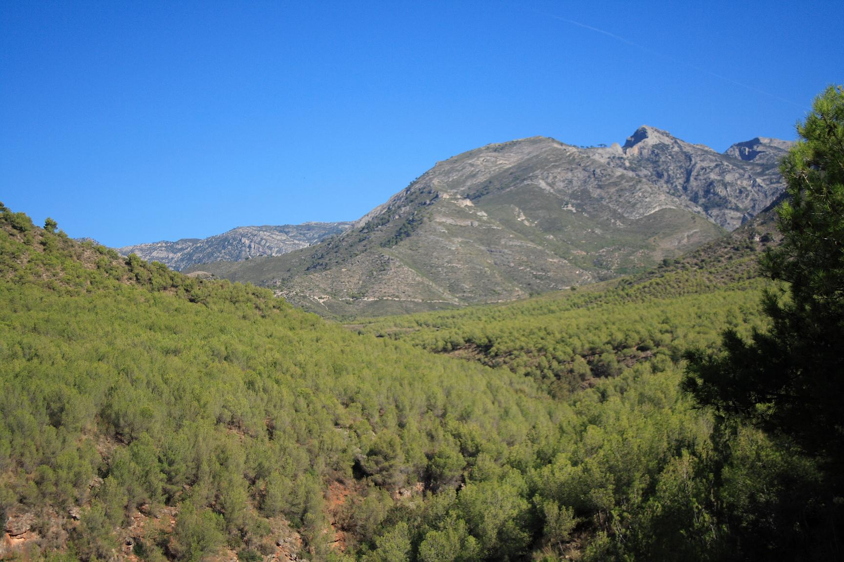 Sierra Almijara, Málaga/Granada, Spain, with Pinus halepensis forest Sierra Almijara, Provincias de Málaga/Granada, España